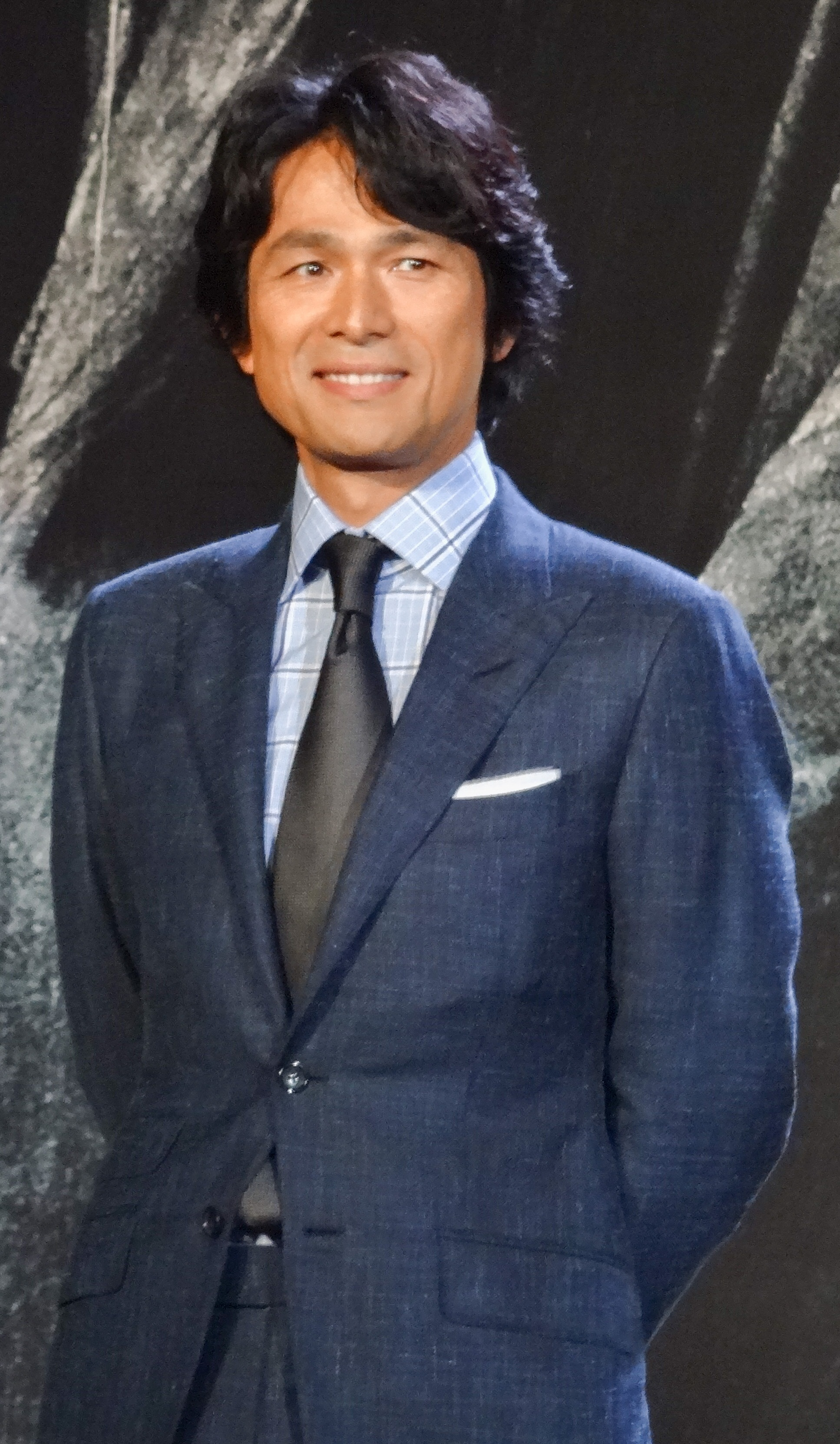 るろうに剣心 京都大火編/伝説の最期編 レッドカーペット 江口洋介